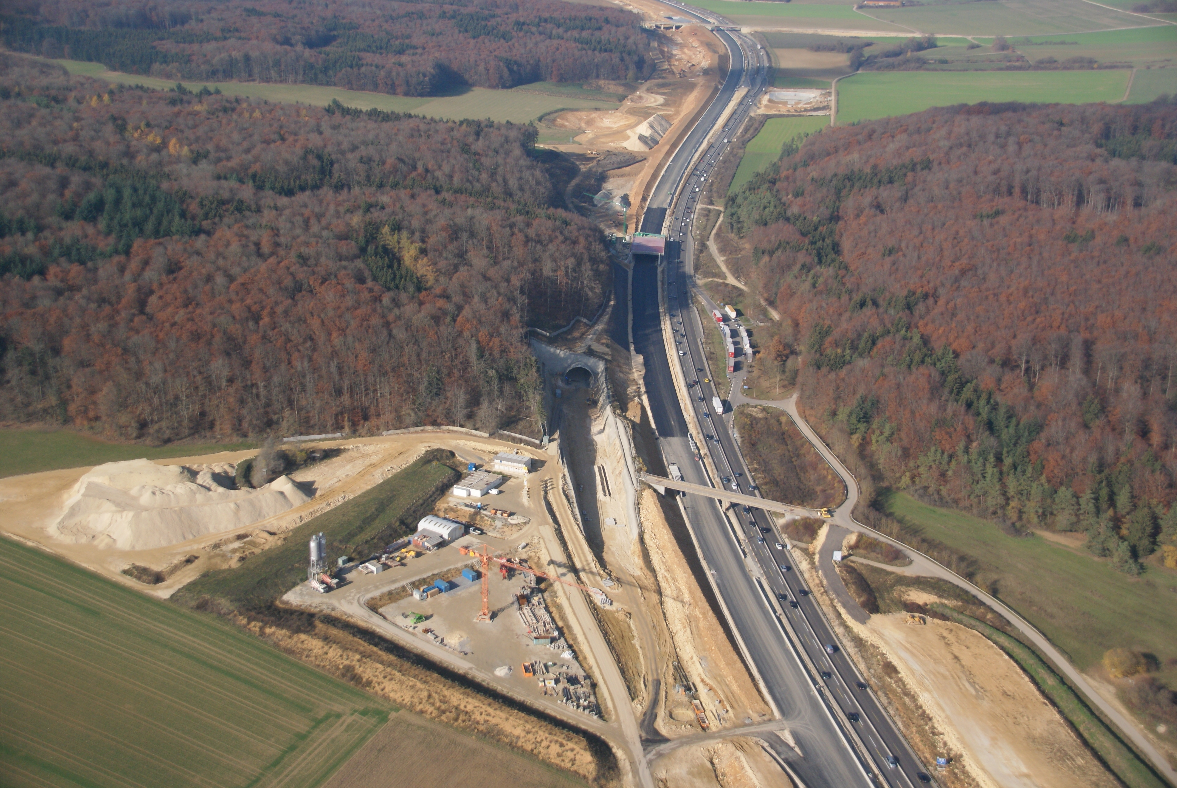 NBS-Wendlingen-Ulm, PFA2.3: Tunnelarbeiten beim ehemaligen/zukünftigen Parkplatz Imberg (A8, zwischen Merklingen und Ulm-West).